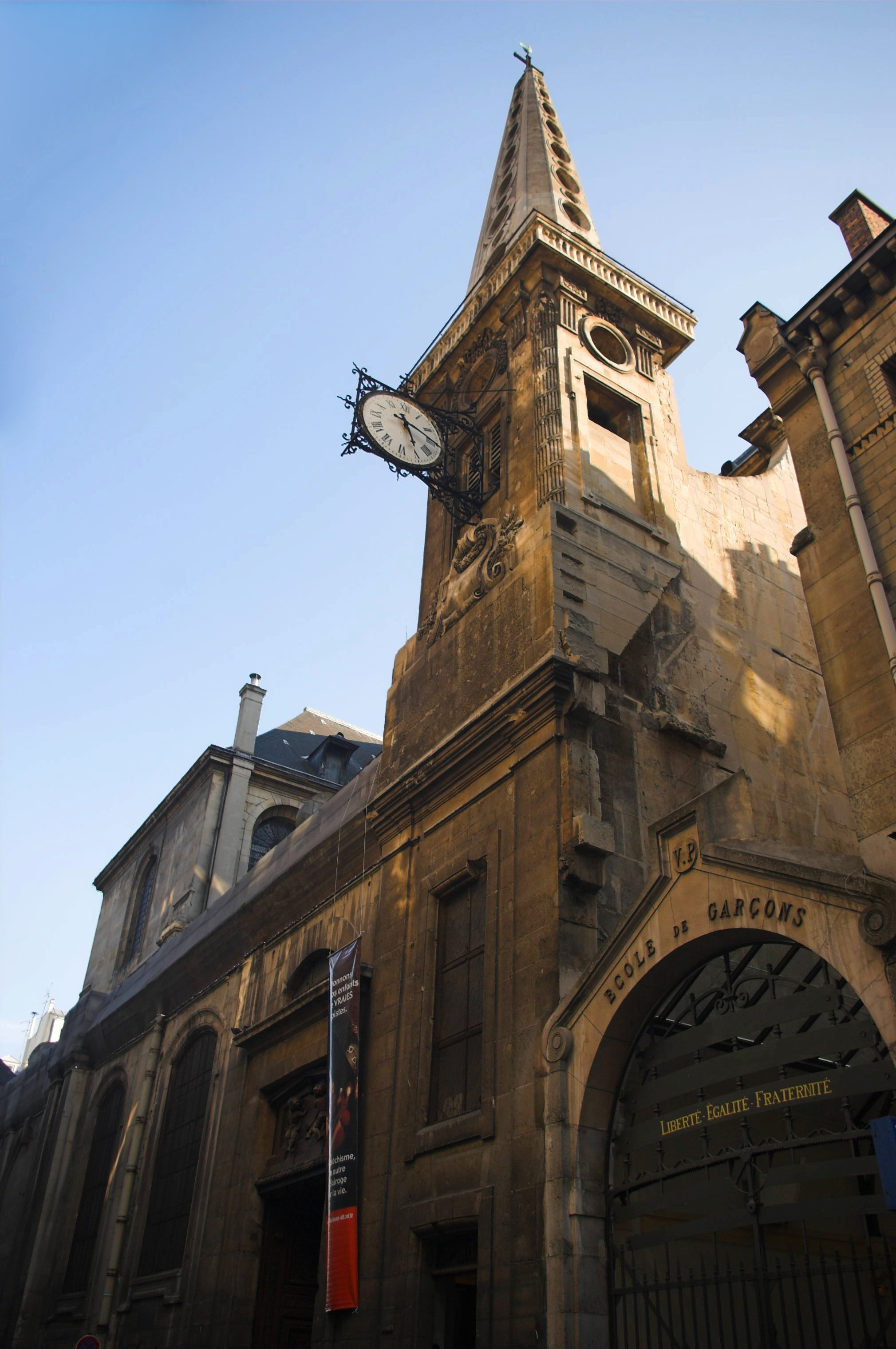 Eglise Saint-Louis en l'île, Paris IVème.